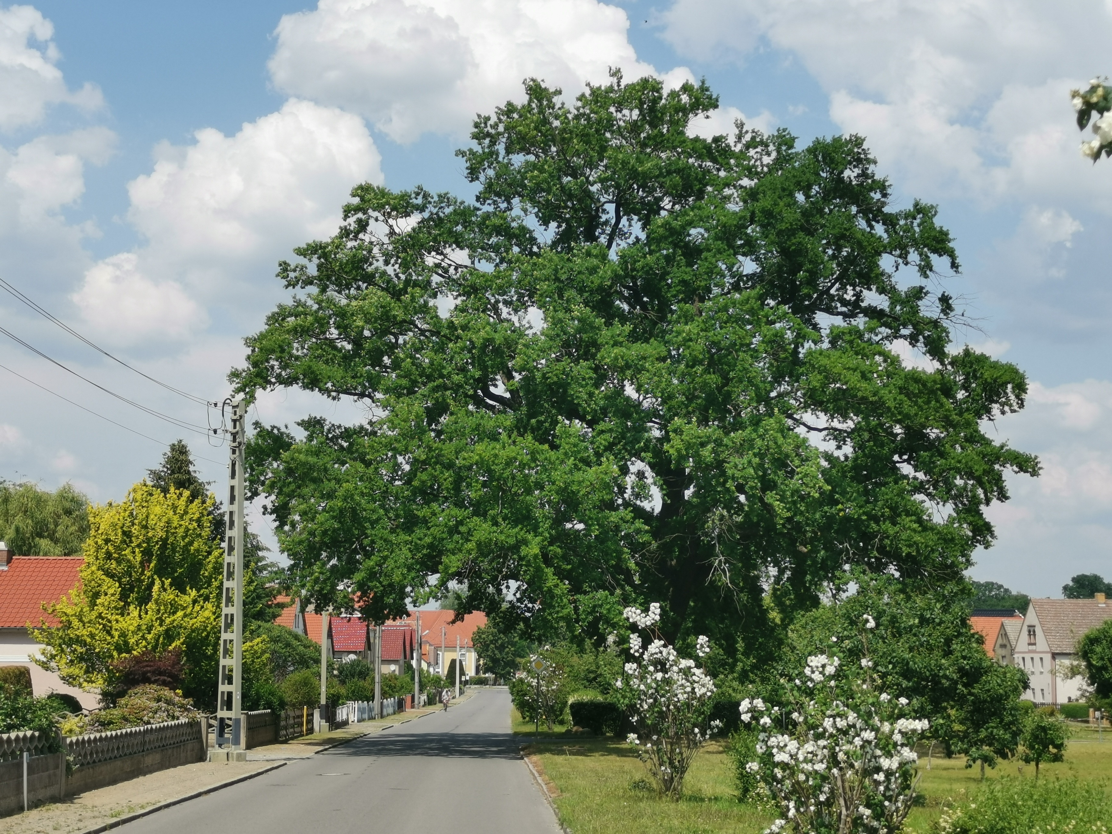 Als Naturdenkmal geschützte Stieleiche in der Blochwitzer Straße in Großkmehlen